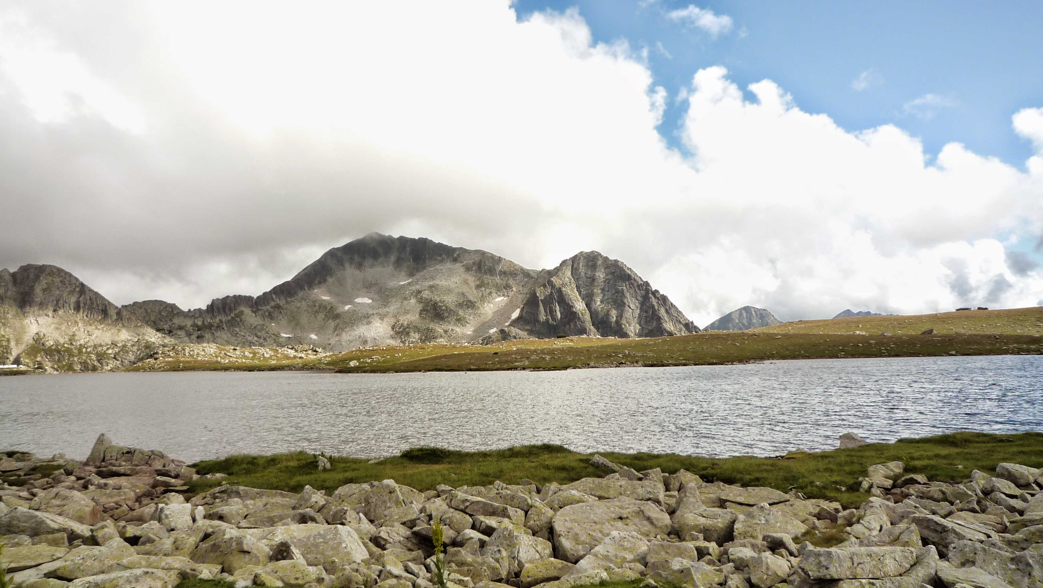 Тевно езеро и Каменица